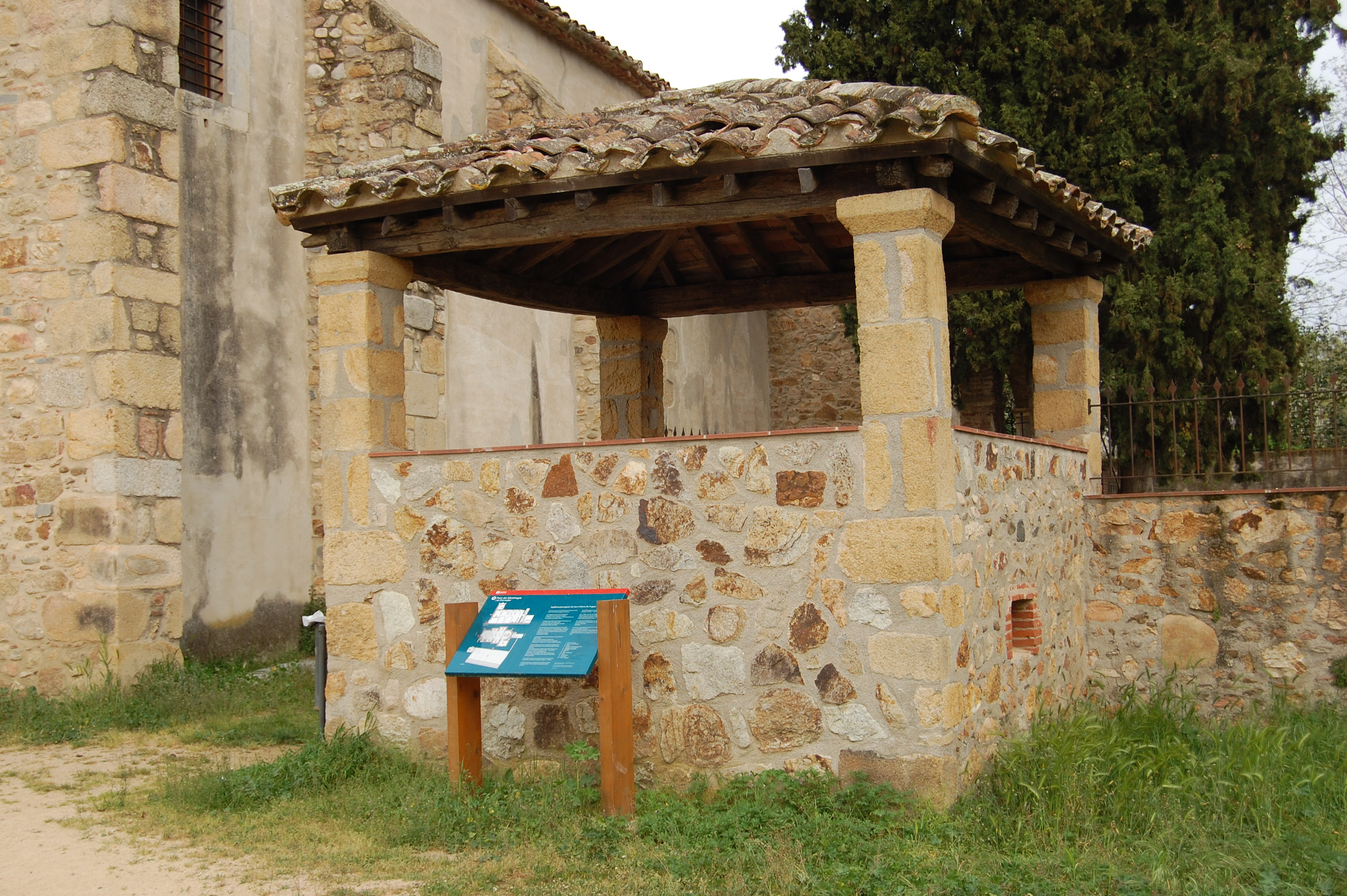 Comunidor de l'església de Sant Cebrià de Fogars de la Selva.